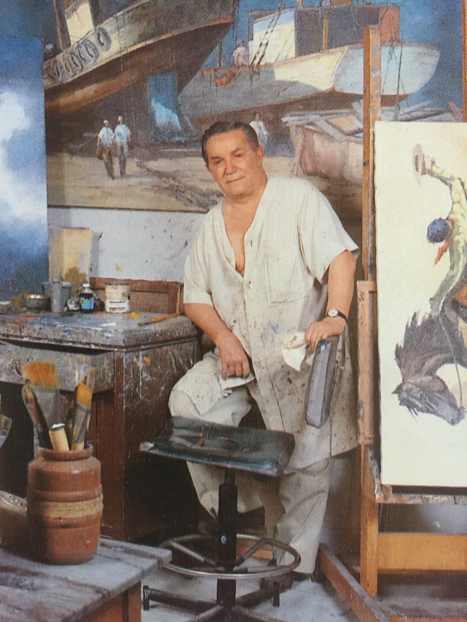 Sansão em seu Atelier